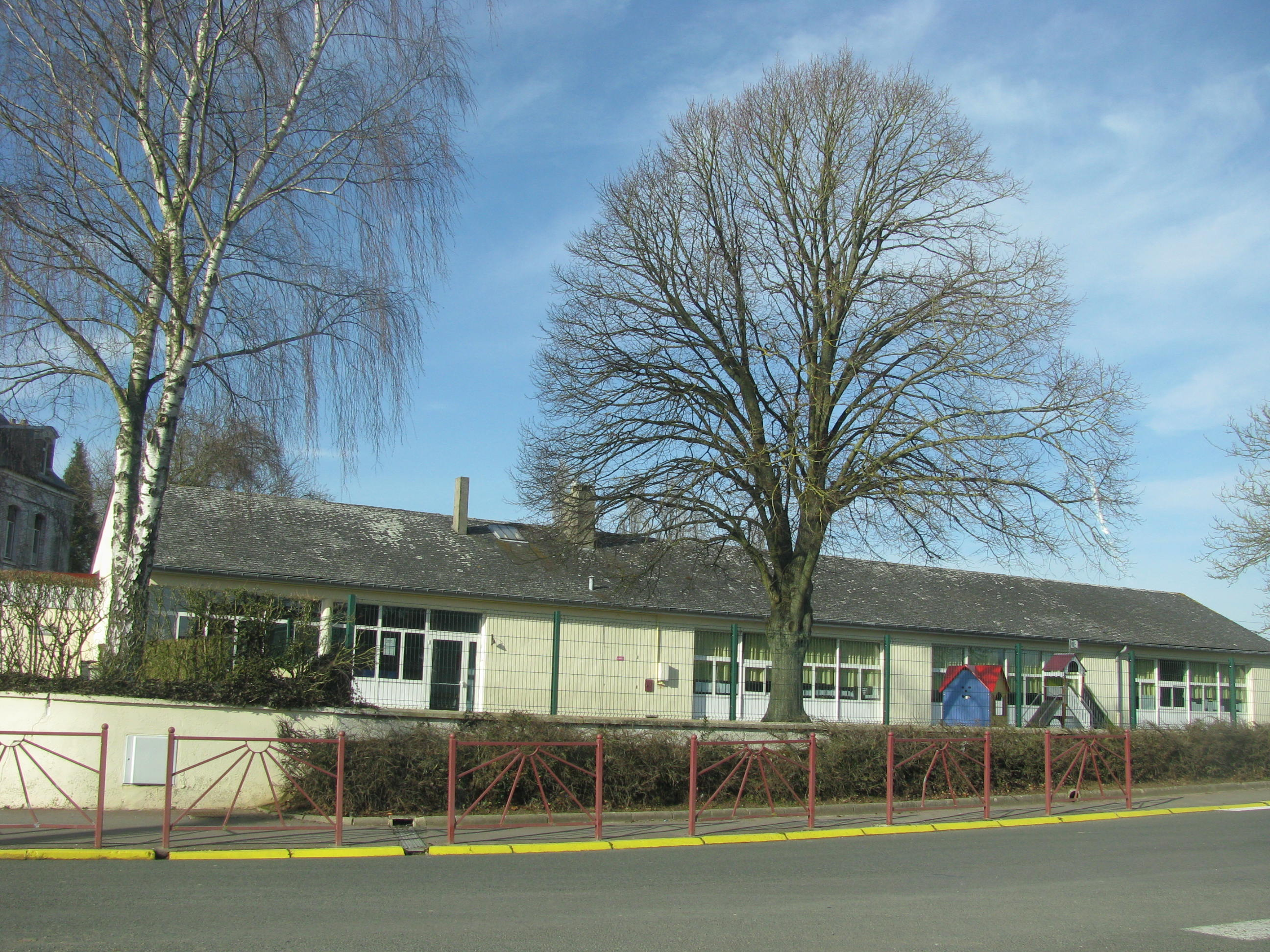 Ecole maternelle de Chepy